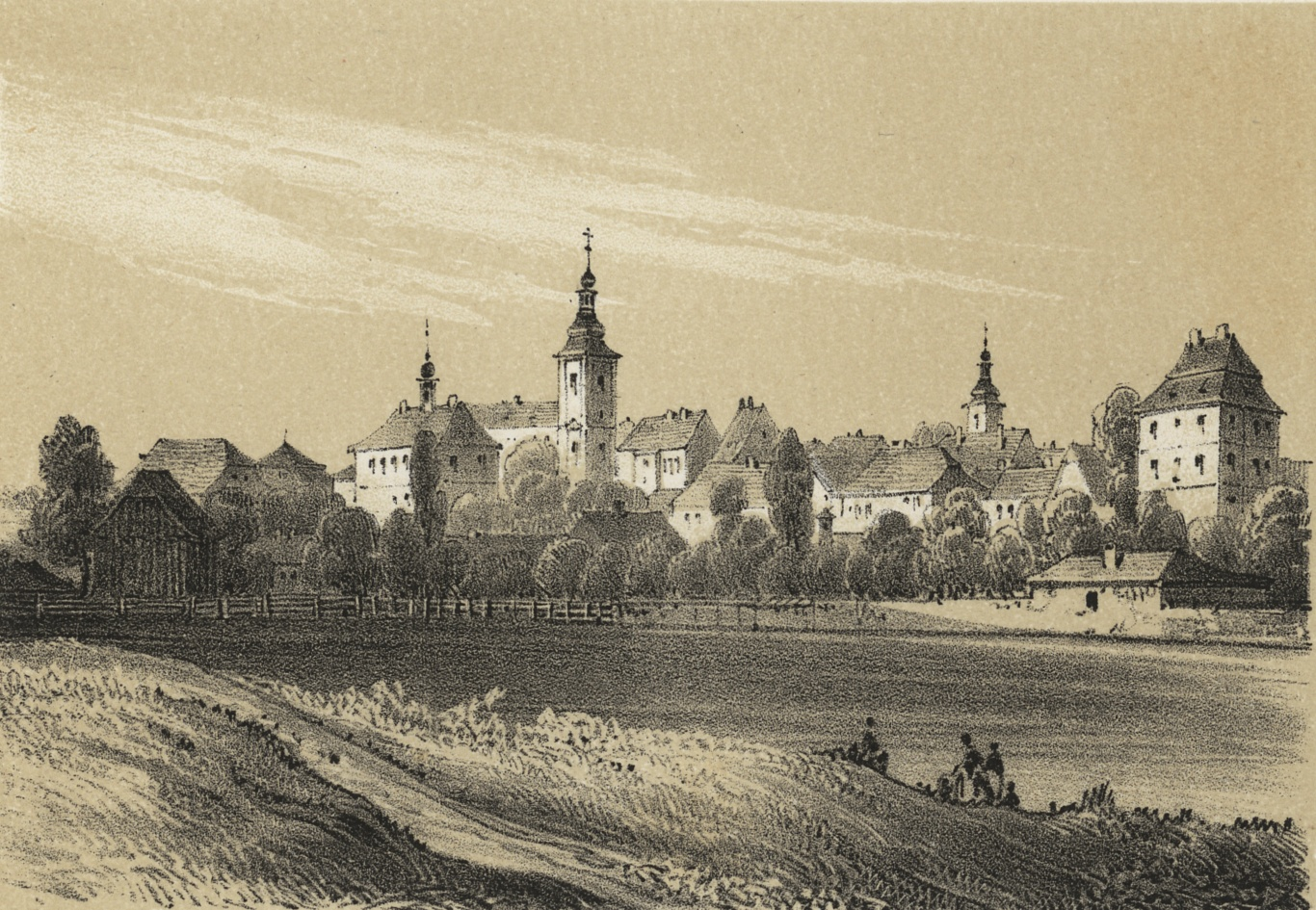 Přelouč